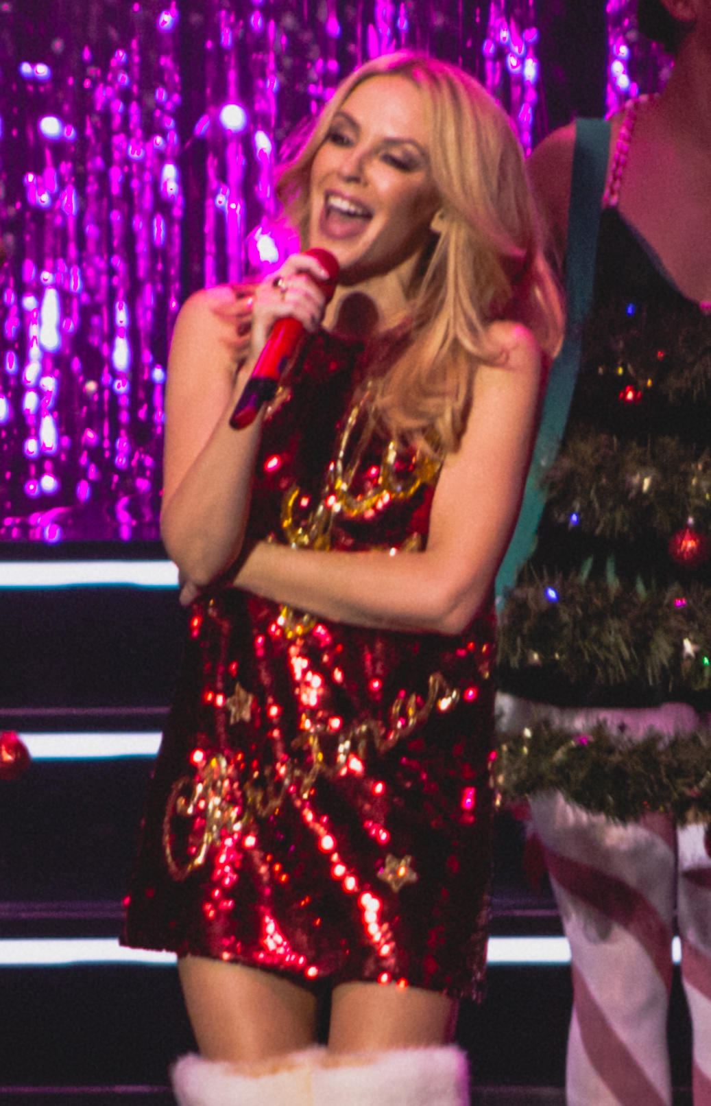 KylieRAH111215-19